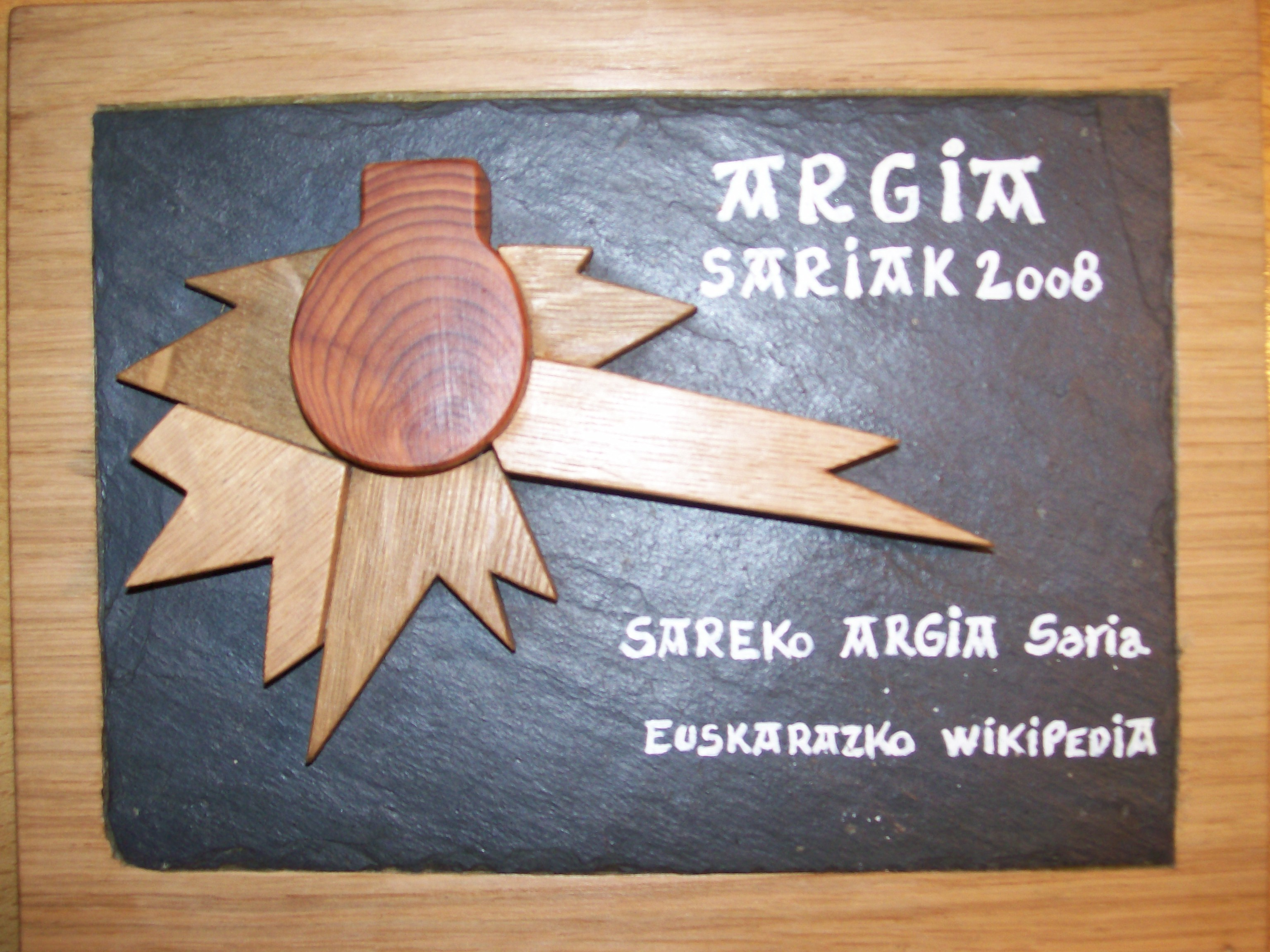 Euskarazko wikipediak jasotako saria